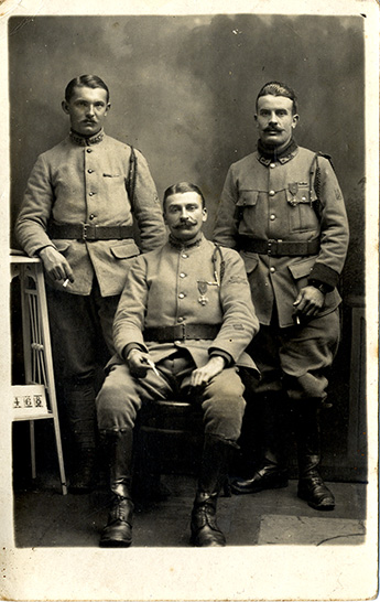 Photographie d’Amédée Desforges (assis) avec deux camarades de régiment (s.d.) Note : probablement en 1918 Amédée Desforges, le grand père du contributeur, est né le 8 décembre 1891 à Beauzée-sur-Aire dans la Meuse. Mobilisé, il est incorporé à la compagnie hors rang du 165ème régiment d’infanterie, avec le grade de caporal au poste de téléphoniste. Il est blessé à Verdun en décembre 1914, puis au moulin de Laffaut dans l’Aisne en septembre 1918. Cité à l’ordre du régiment, il est décoré des croix de guerre et des médailles militaires françaises et belges.